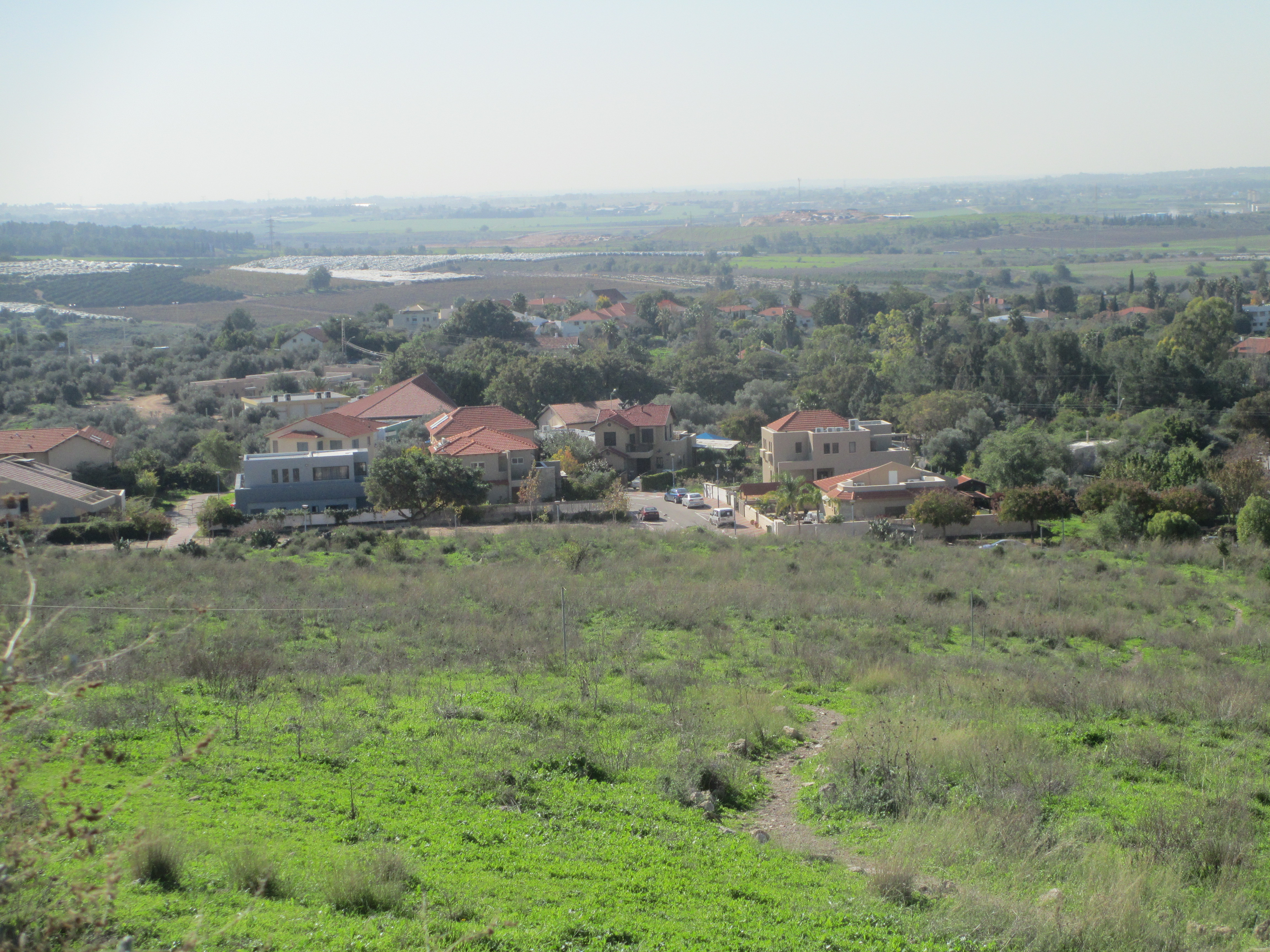 מבט על מושב גמזו מתל גמזו